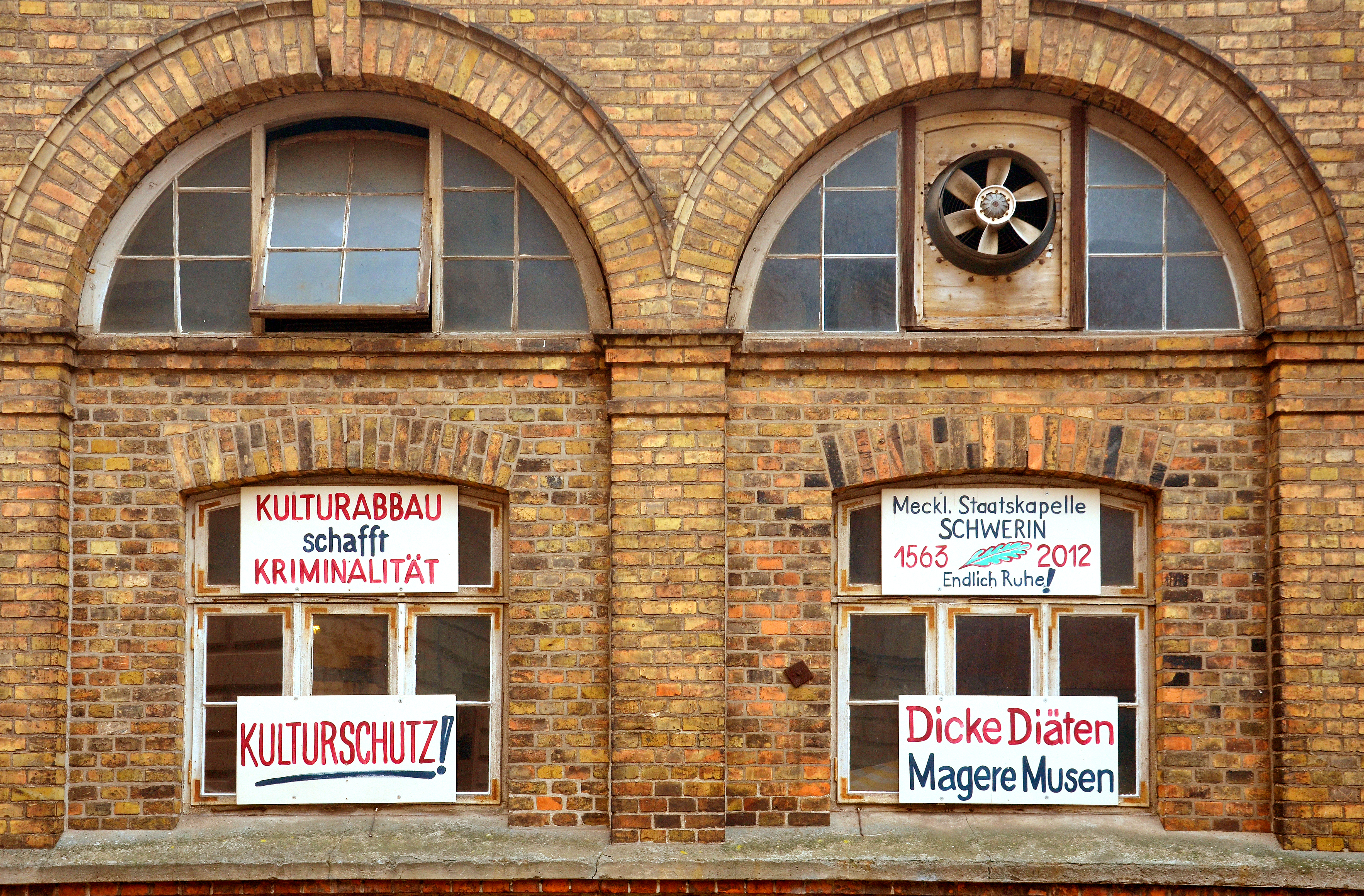 Protest-Tafeln an den Fenstern in der Theaterstraße 6 in Schwerin mit den Texten „Kulturabbau schafft Kriminalität Kulturschutz! Meckl. Staatskapelle Schwerin 1563 [ - ] 2012 / Endlich Ruhe! Dicke Diäten / Magere Musen“ aufgenommen am 2. November 2015 nach dem von verschiedenen Wikipedianern veranstalteten Arbeitstreffen Wikipedia:WikiDACH 2015 im Schweriner Schloss ...